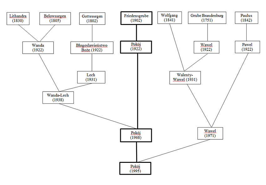 Zusammenhänge zwischen den Bergwerken in Nowy Bytom